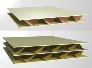 structure de carton ondulé simple et double cannelures. Réalisation personnelle.